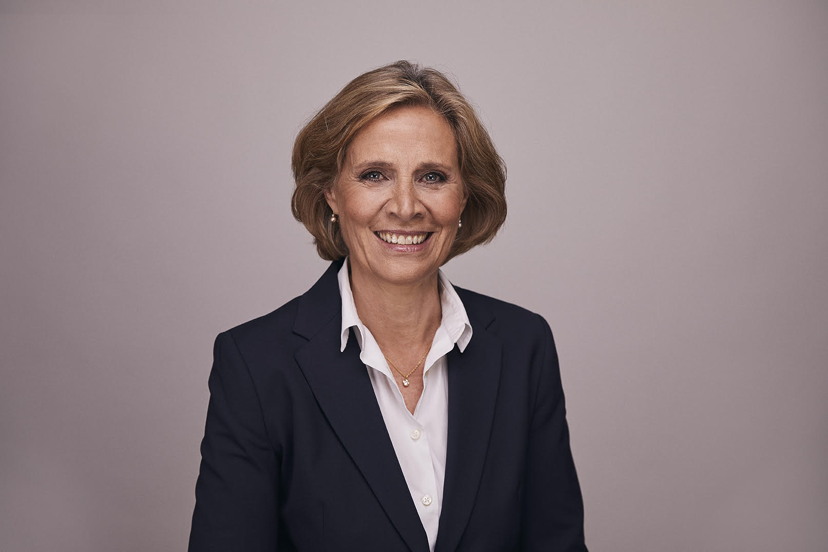 Portrait von Patricia von Falkenstein